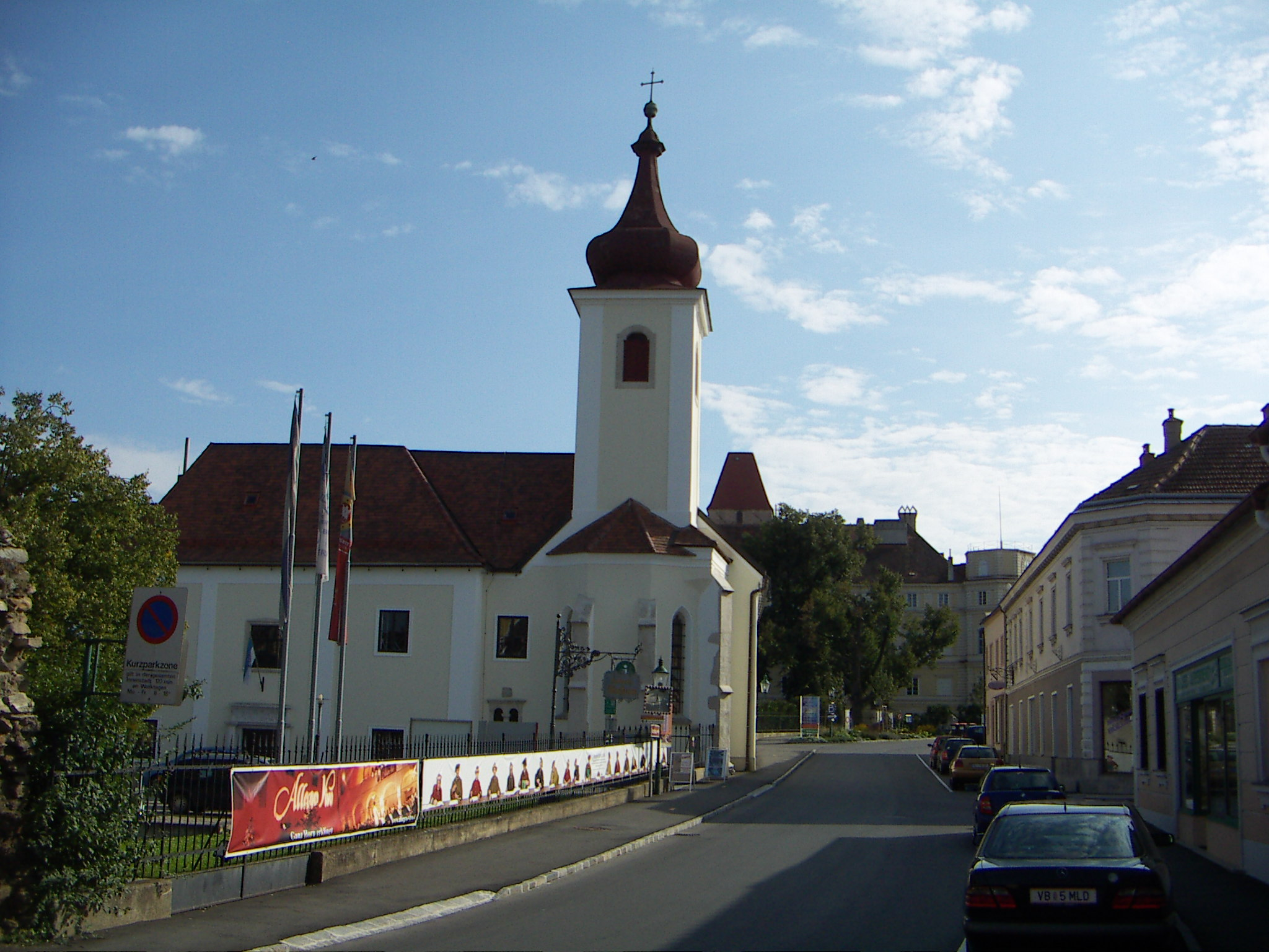 Höbarthmuseum, ehemalige Spitalskirche, jetzt Höbarthmuseum